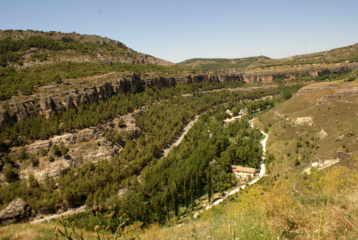 Parte de la hoz del Río Júcar a su paso por la ciudad de Cuenca. Casco Antiguo y paisaje que rodea a Cuenca, Castilla-La Mancha